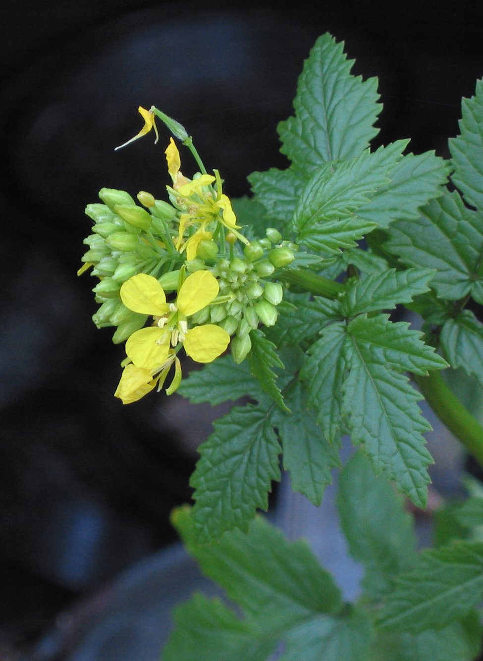 (nl: Gele mosterd bloemen) Sinapis alba flowers